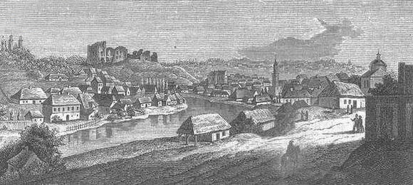 Бучач 1860-х років